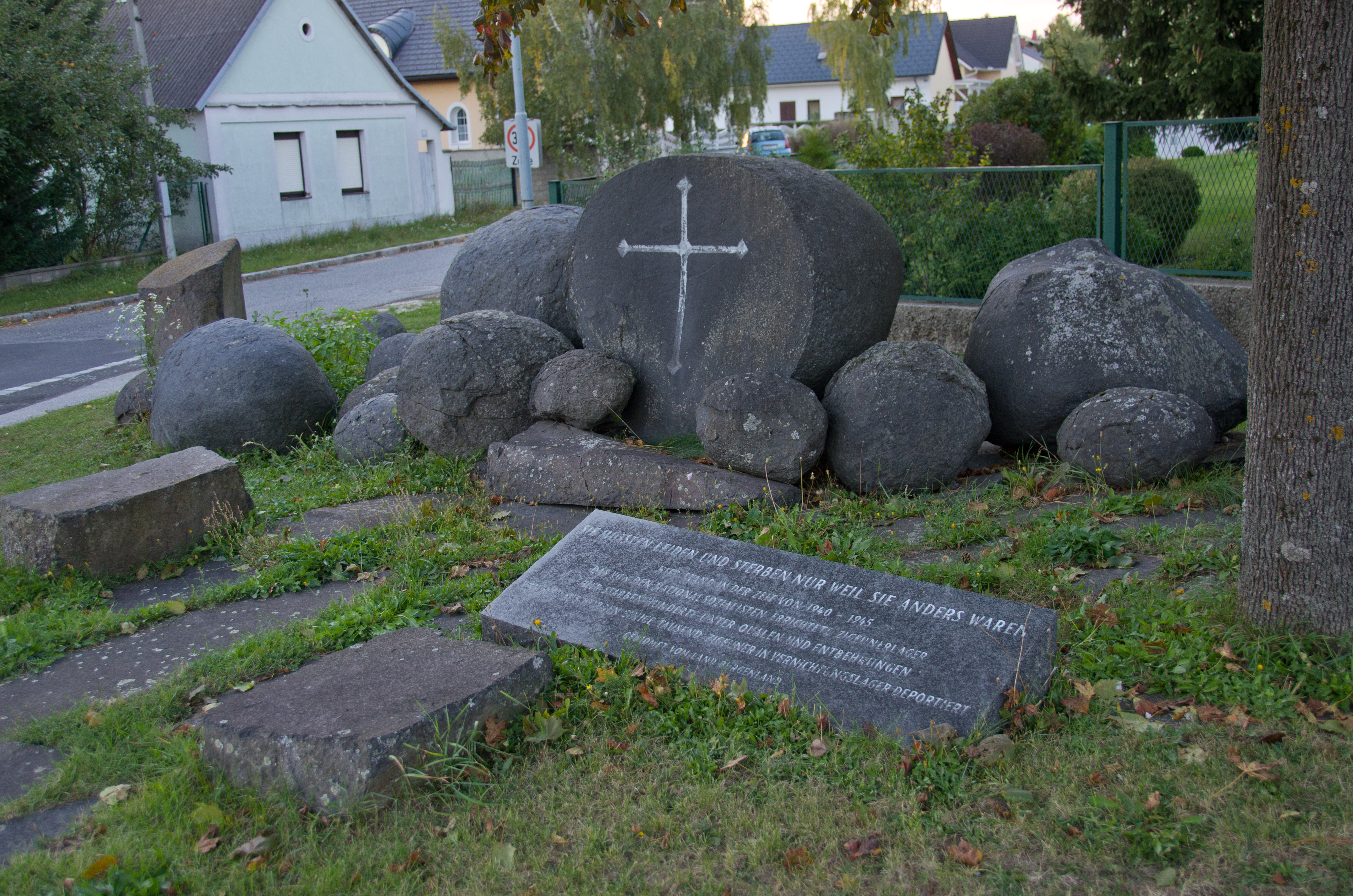 Zigeunermahnmal